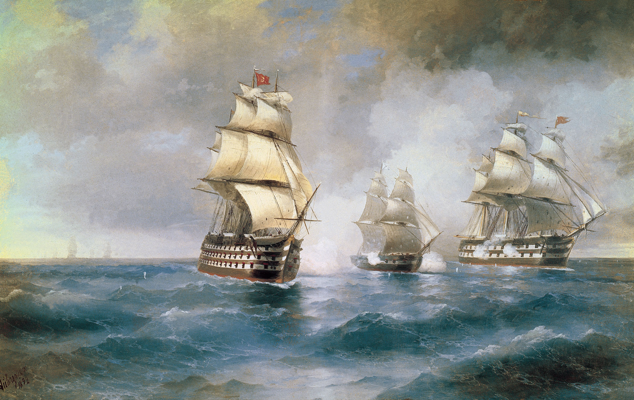 И. К. Айвазовский. Бриг «Меркурий», атакованный двумя турецкими кораблями. 1892. Холст, масло. 212 × 339 см. Феодосийская картинная галерея имени И. К. Айвазовского, Феодосия, Крым.